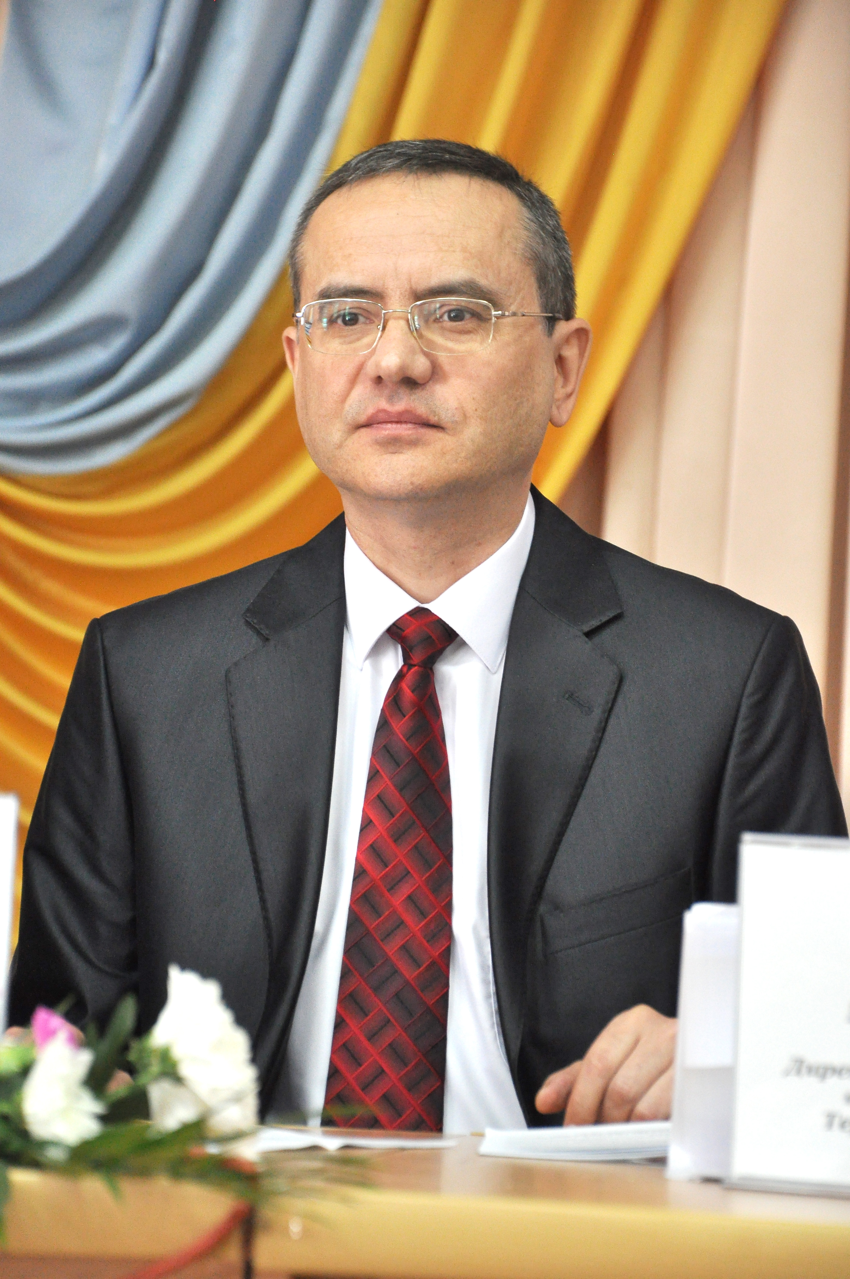 Український вчений у галузі біохімії, доктор медичних наук, професор, ректор Тернопільського державного медичного університету імені І. Я. Горбачевського Михайло Михайлович Корда.